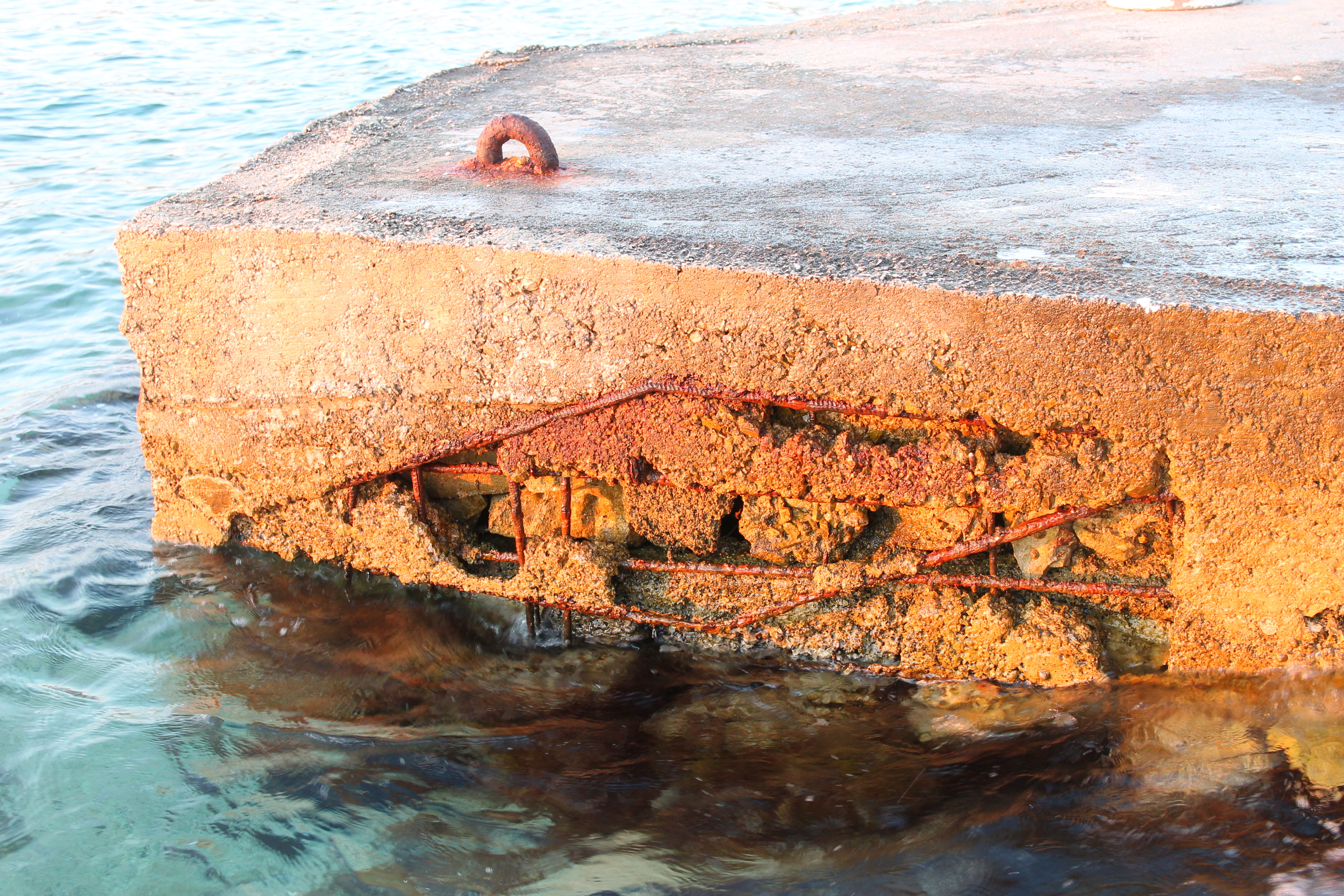 Maslinica, beton korodovaný působením mořské vody